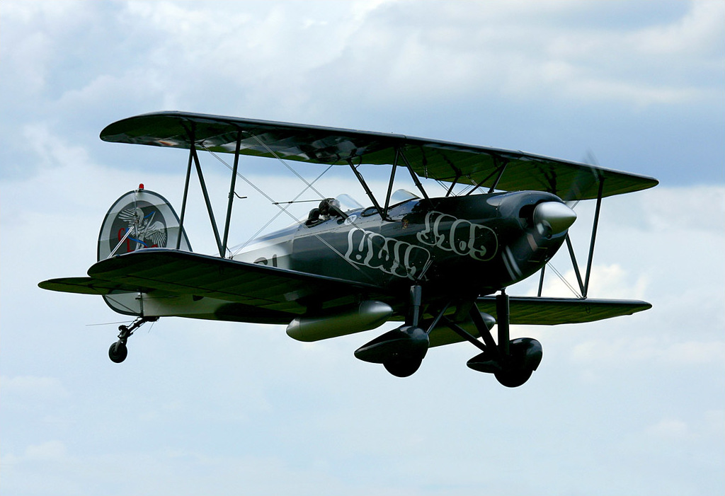 Great Lakes 2T-1A-2 D-EBGL